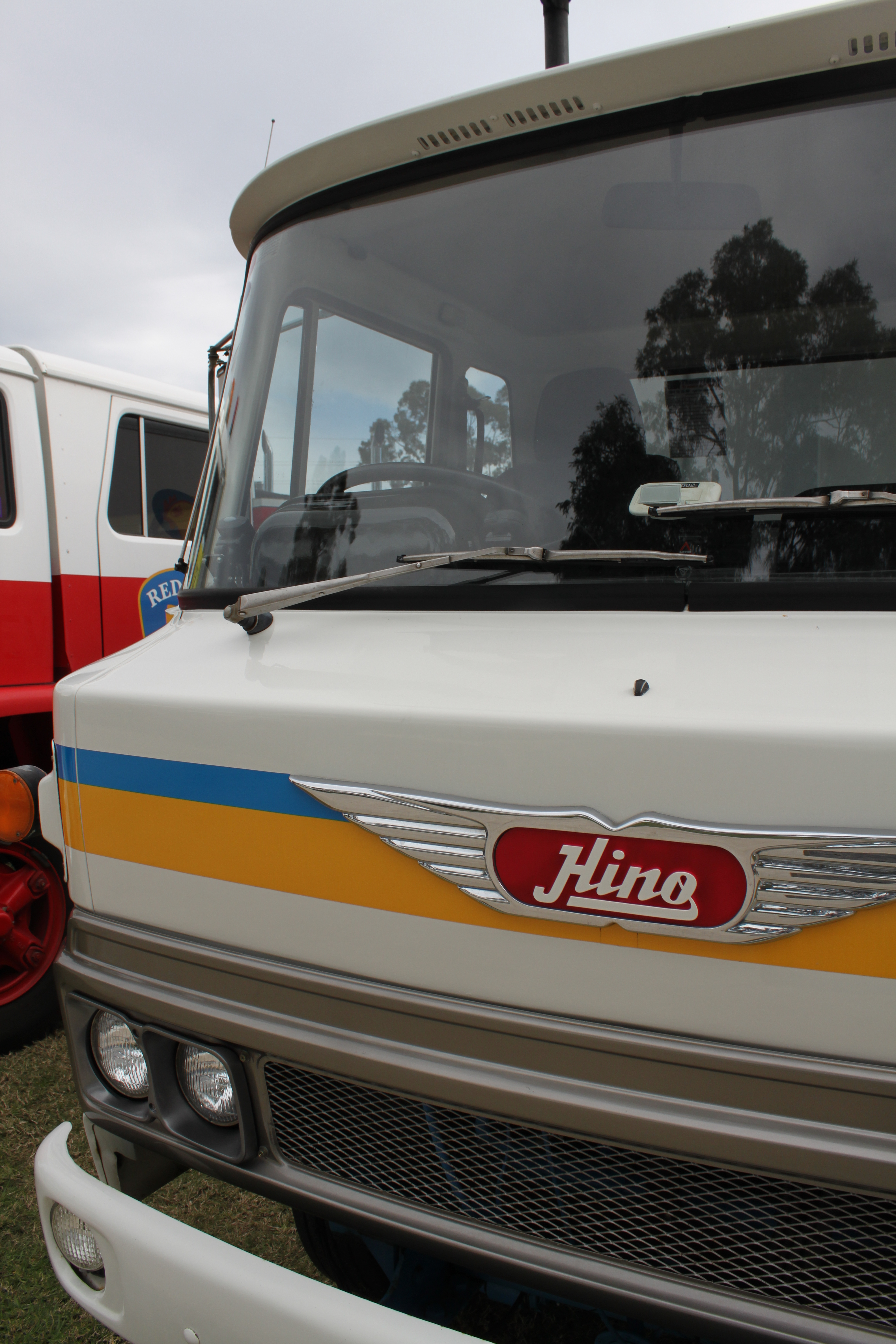 Hino Truck